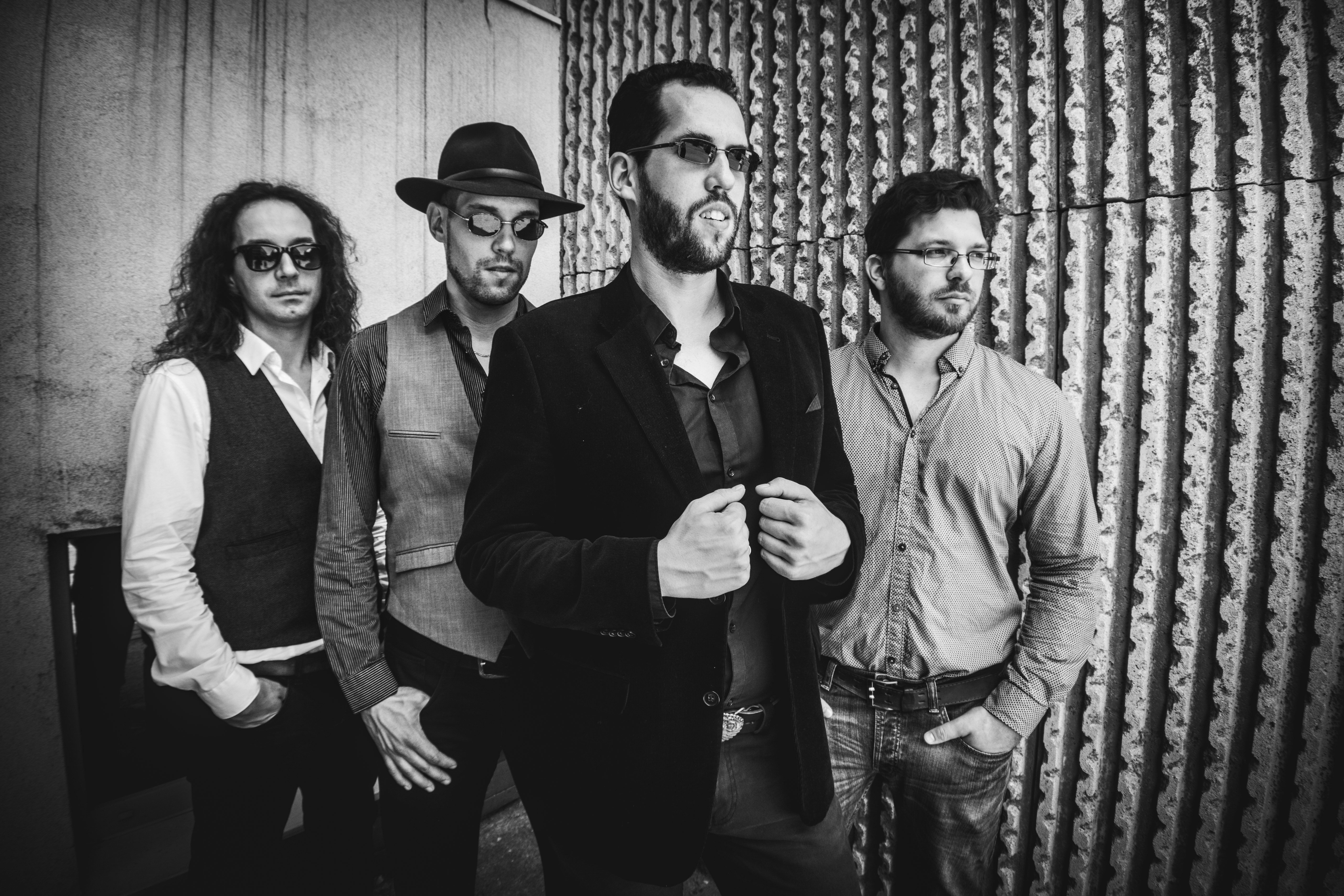 The Butchers (2018)